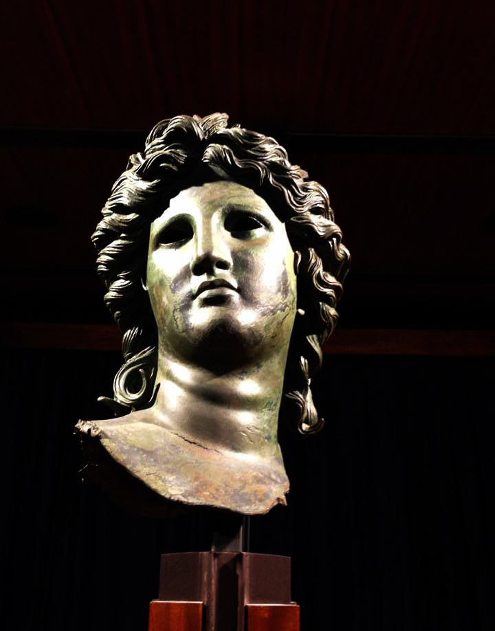 Foto della testa di Apollo, reperto esposto al Museo Archeologico Provinciale di Salerno